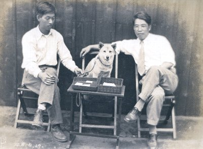 １９３３年、真一（左）と愛犬ぜま、日本犬保存会犬舎開場式